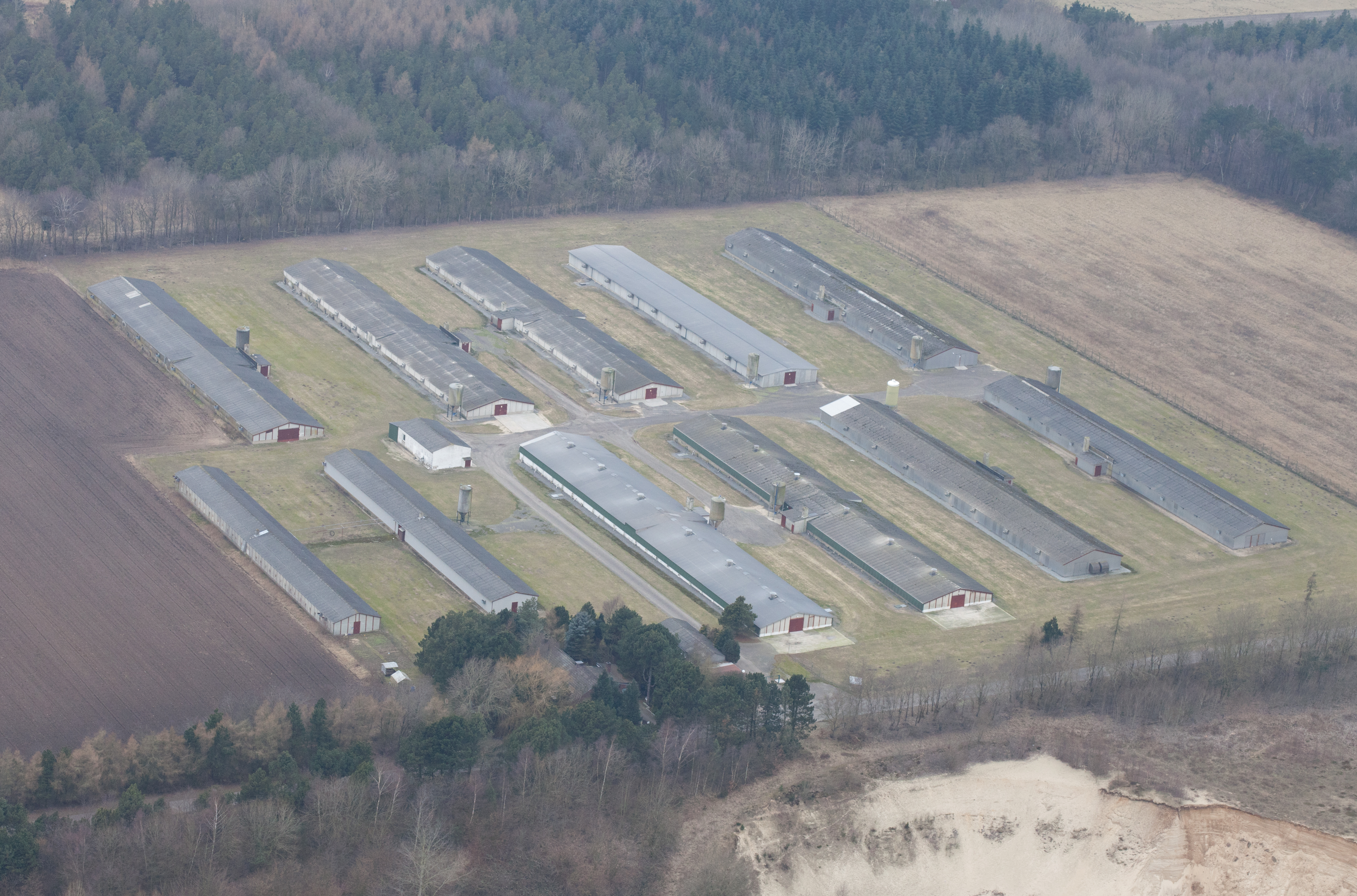 Luftaufnahme: Farm Spieka II (Hybridhühner, Geflügelzuchtanlage der Aviagen-EPI, EW Group) in Nordholz, Gemeinde Wurster Nordseeküste